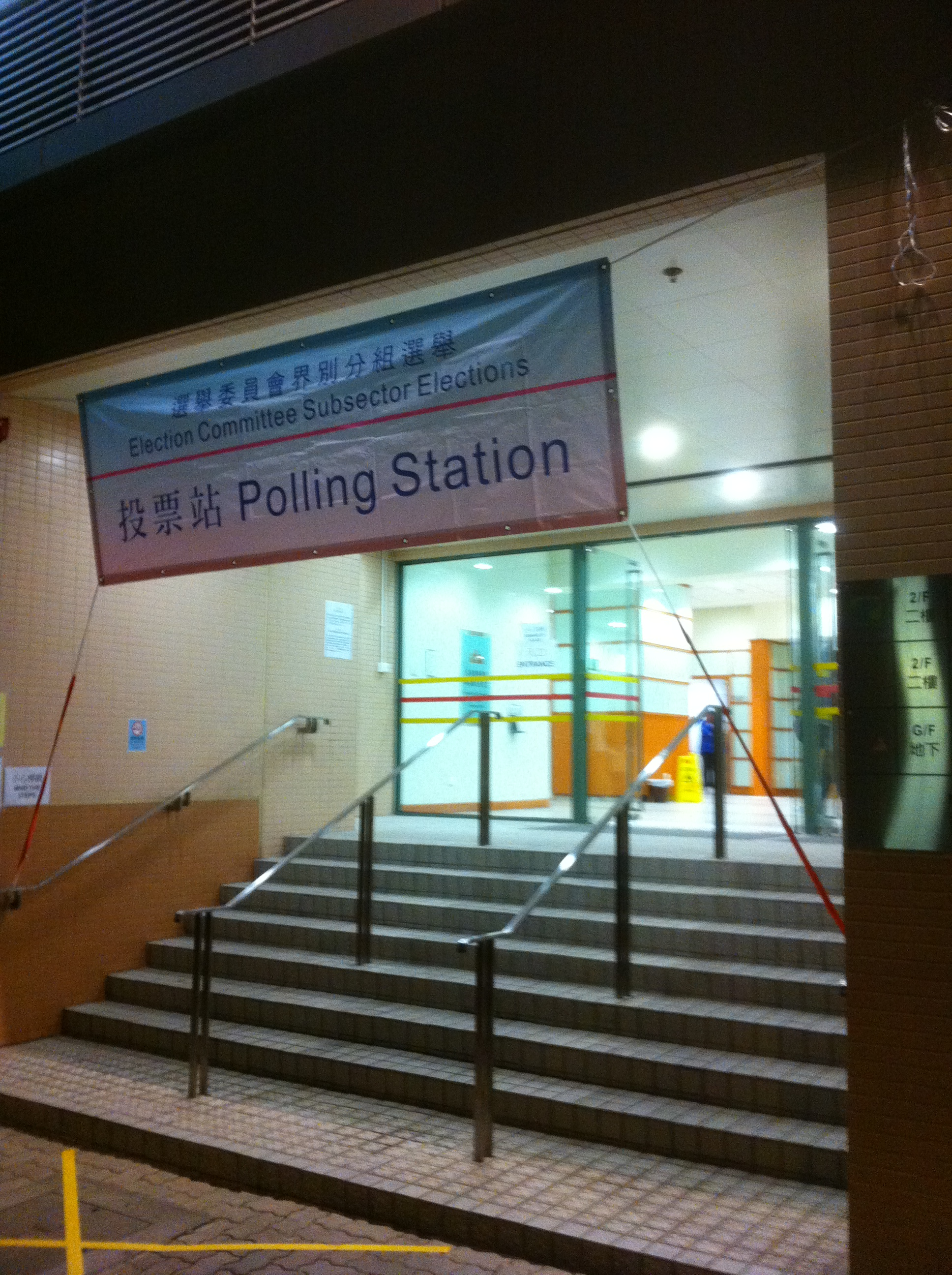 2011年香港選舉委員會界別分組選舉的其中一個票站